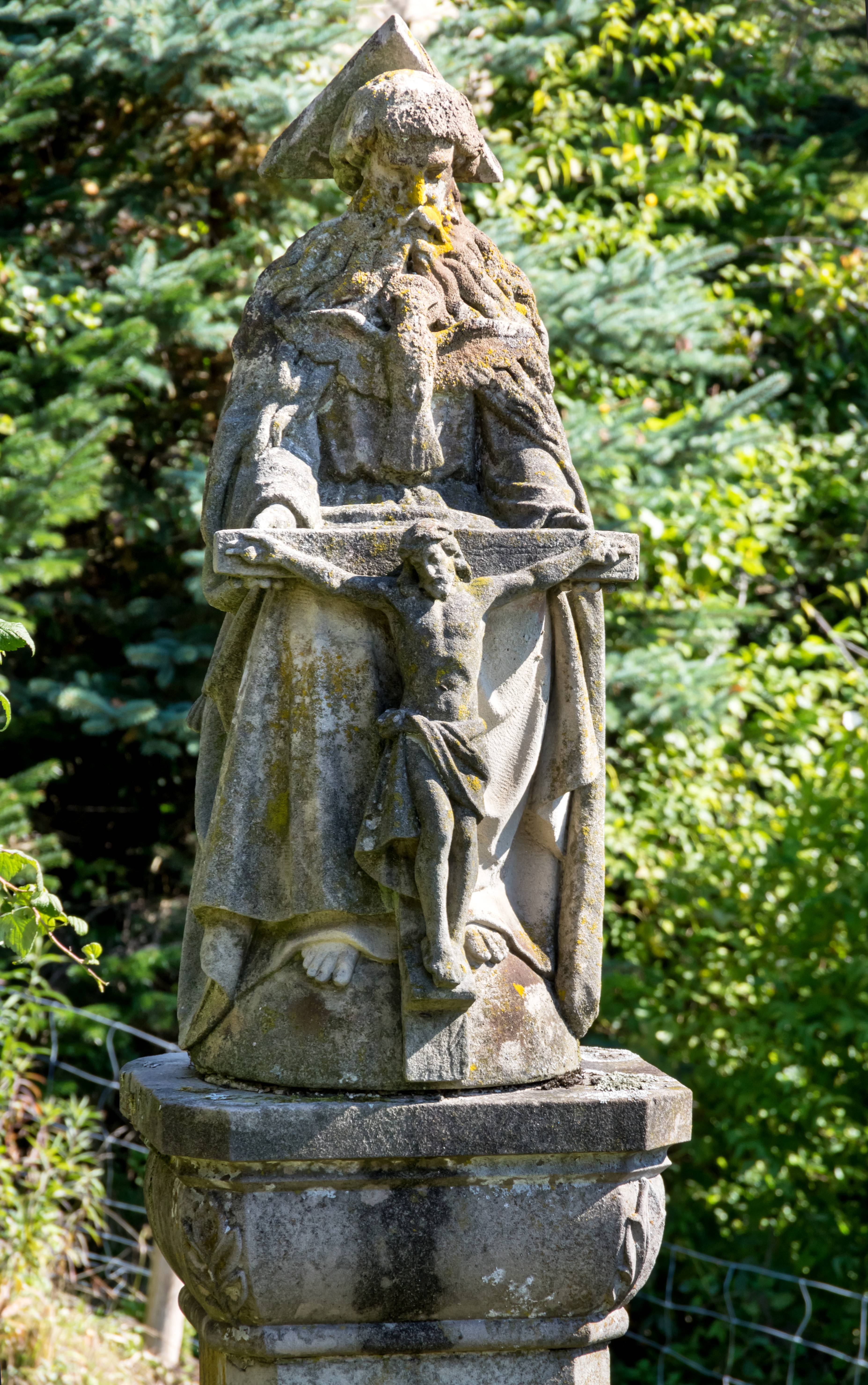 Der Gnadenstuhl auf dem Kapfenhof